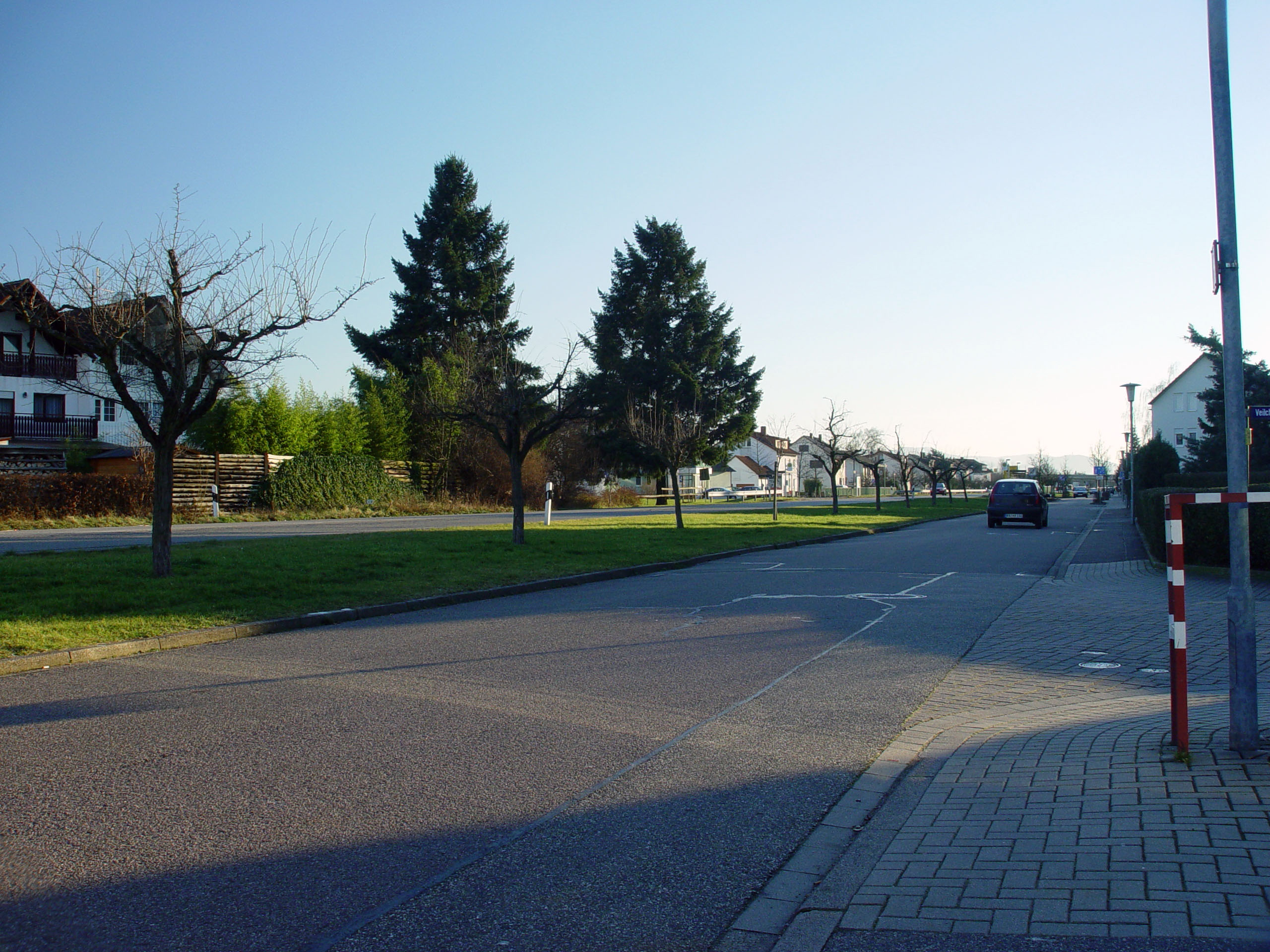 Im Hintergrund, die ehemalige B36 im badischen Bietigheim, heute ist die Badenstraße nur noch Ortsstraße. Das Bild wurde in der Höhe Veilchenstraße Richtung Rastatt aufgenommen. Die kleinere Straße im Vordergrund, die das Bild einnimmt, ist die Rastatter Straße.